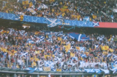 photo perso des suppoters de l'Écosse lors du match d'ouverture de la Coupe du monde 1998 au Stade de France. Clio64 8 juin 2006 à 20:09 (CEST)